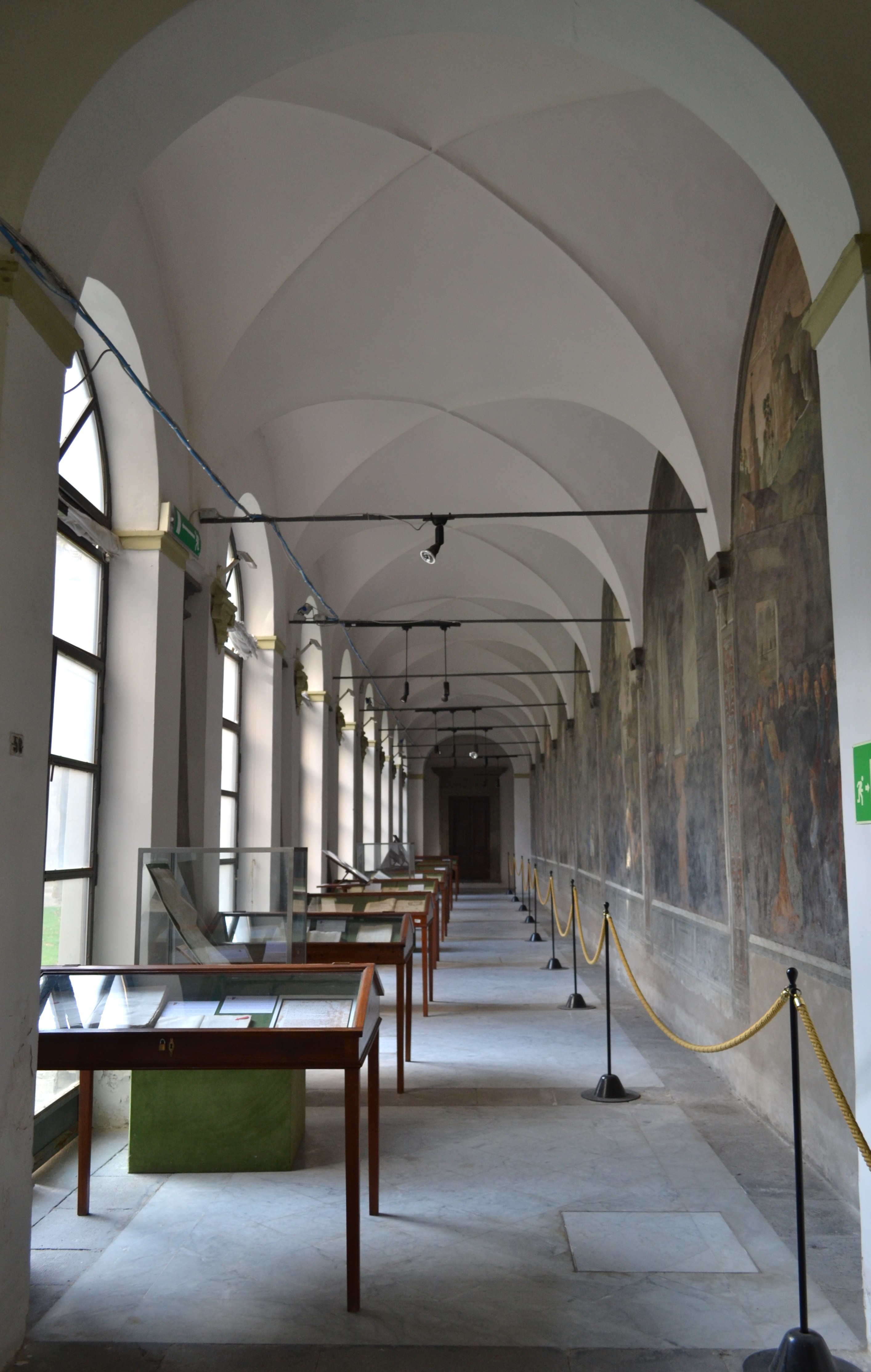 Chiostro del Platano - Convento dei Santi Severino e Sossio di Napoli. Scorcio sulle Storie di San Benedetto di Antonio Solario (1515 ca)